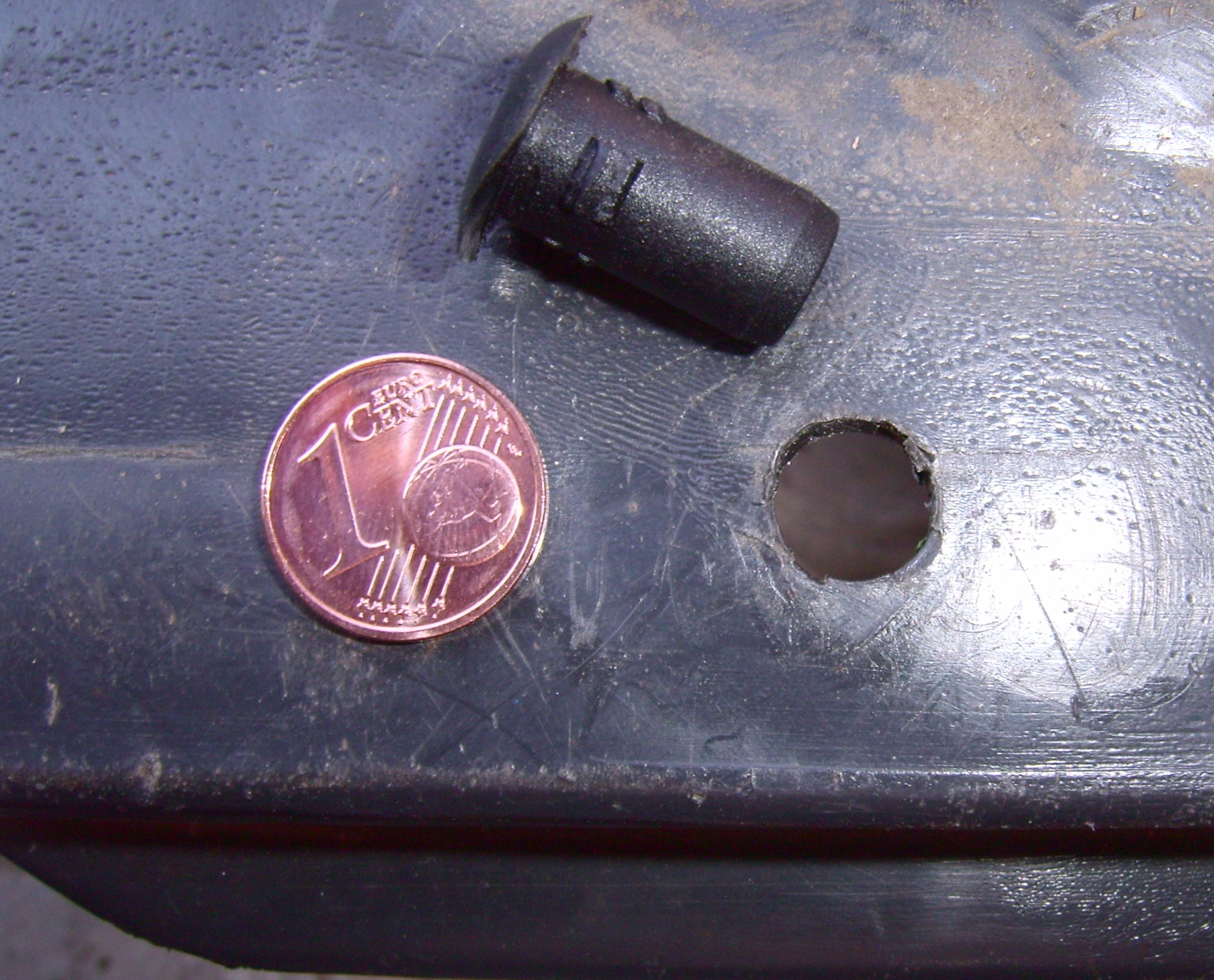 RFID-Chip an Cellex-Abfallbehaelter 2013 Montagebohrung (mit Eurocentstück als Größenvergleich)